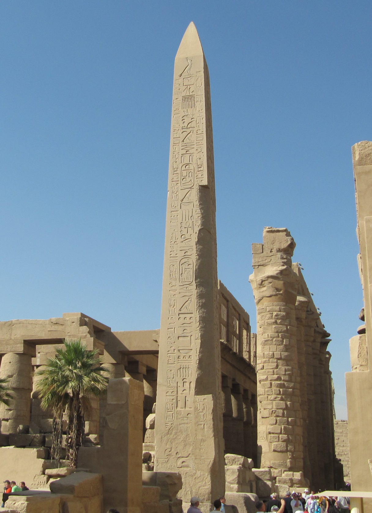 Obelisk van Thoetmosis I, dec 2010